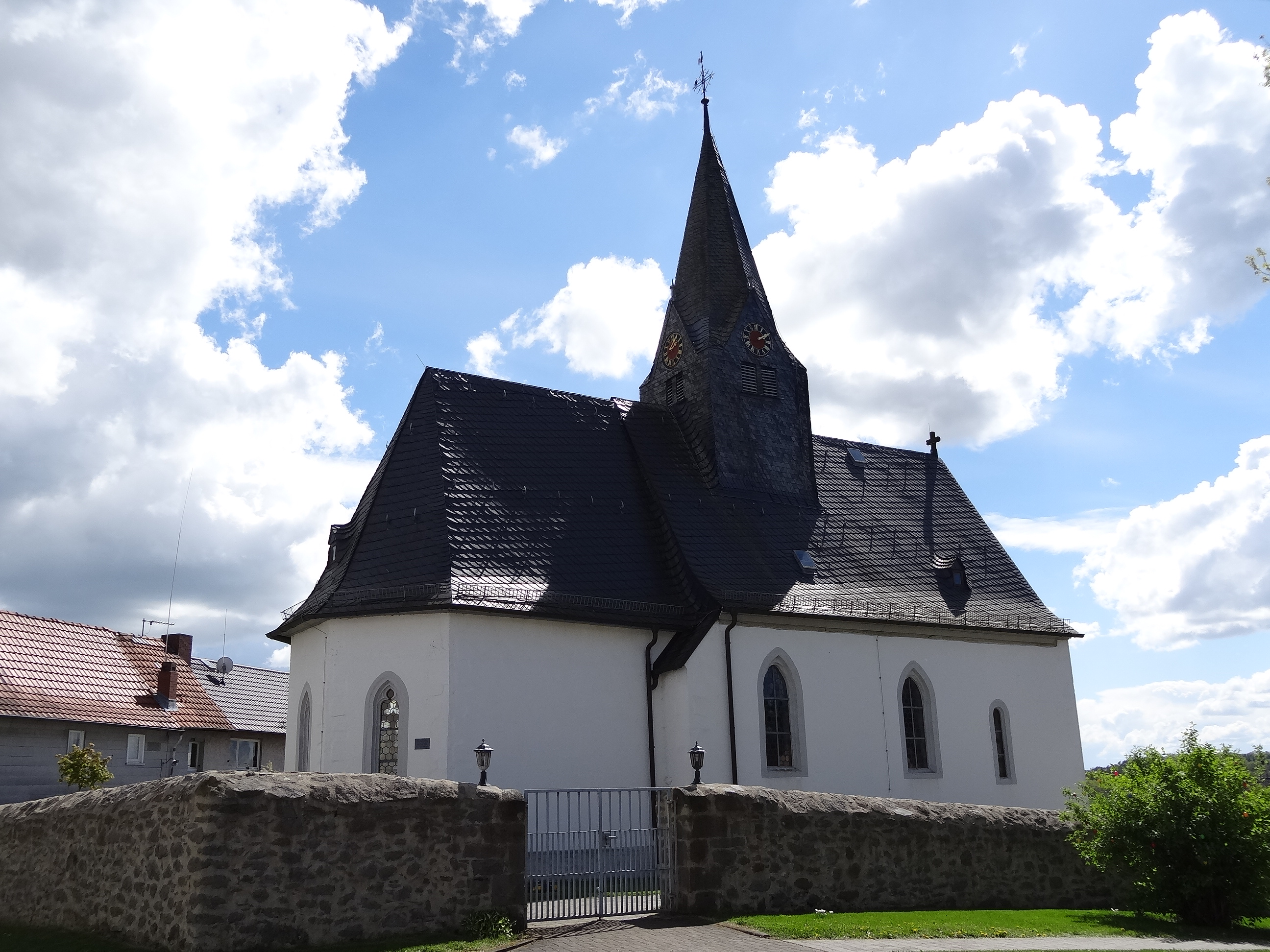 Evangelische Kirche (Ober-Bessingen)